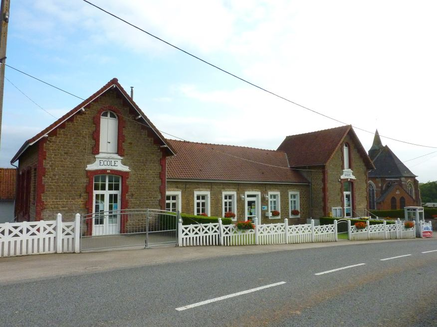 Selles la Mairie-école du village